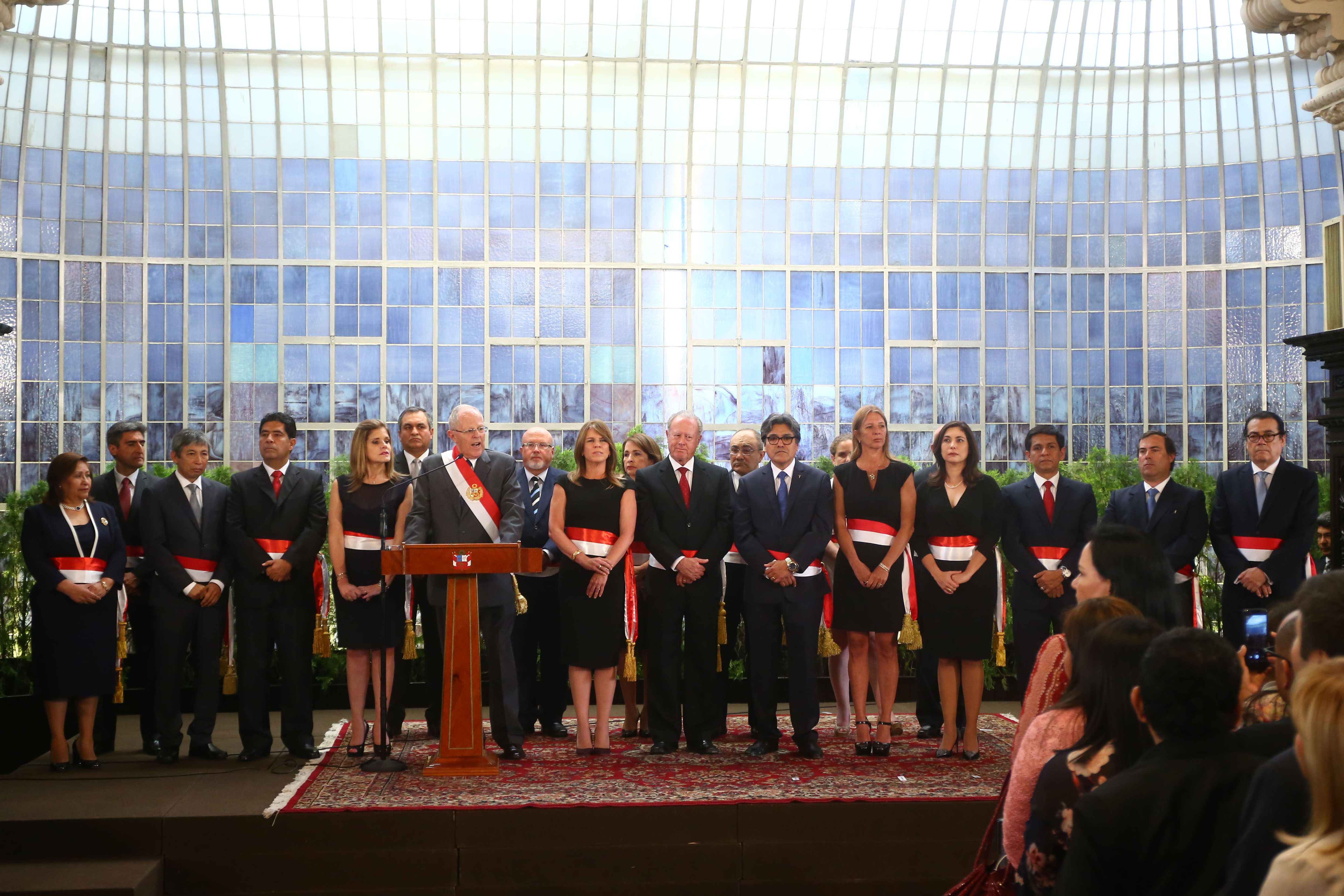 PPK y su gabinete de la Reconciliación, que juró el 9 de enero de 2018.